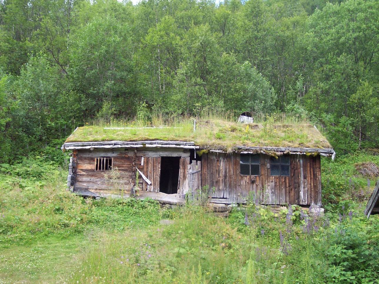 Husmannsbolig i Nordland, ved Kjelvik gård. Gården ligger langs E-6 ca 4-5 km fra Kobbelv vertshus i Sørfold kommune. Gården ligger slik at man stopper på rasteplassen ved E-6 Kjelvik gård (godt merket med skilt for severdighet). Deretter følger man stien til venstre fra parkeringsplassen gjennom en liten dal og opp mot gården.